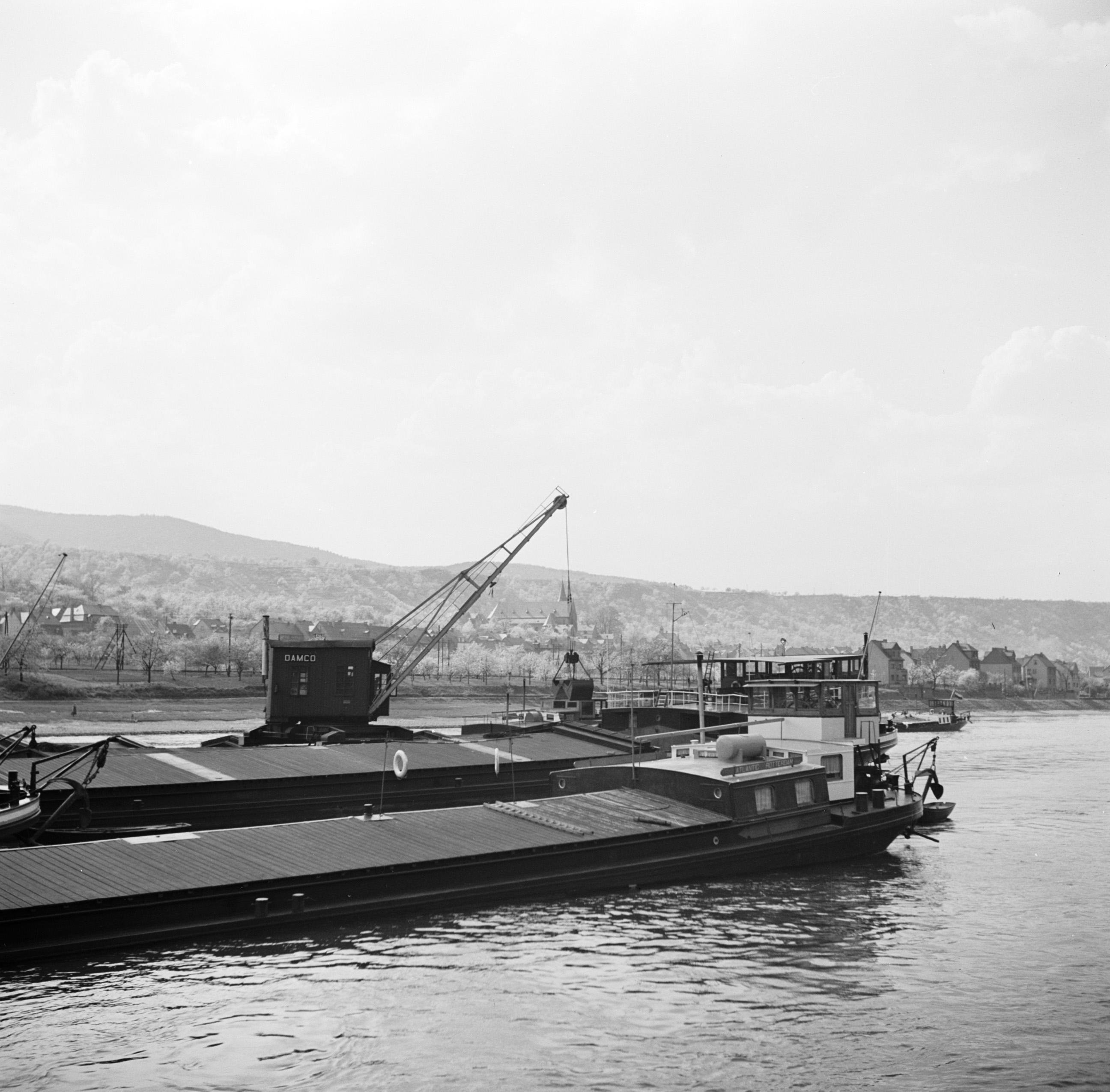 Collectie / Archief : Fotocollectie Van de Poll Reportage / Serie : Rijnvaart, reportage vanaf sleepboot Damco 9: West-Duitsland Beschrijving : Voorbereidingen voor de doorvaart Bad Salzig - Bingen i.v.m. bochten, stroomversnellingen en lage waterstand. Overslag van lading ter hoogte van Bad Salzig, vooraan de Atlantic Datum : 1 april 1955 Locatie : Bad Salzig, Duitsland, West-Duitsland Trefwoorden : binnenvaartschepen, heuvels, hijskranen, laden en lossen, rivieren Fotograaf : Poll, Willem van de Auteursrechthebbende : Nationaal Archief Materiaalsoort : Negatief (6x6) Nummer archiefinventaris : bekijk toegang 2.24.14.02 Bestanddeelnummer : 254-1107